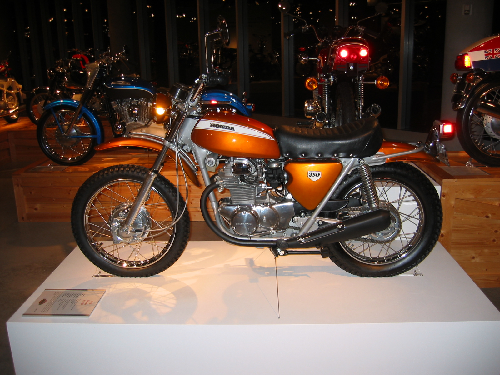 Honda CL350 @ Barber Motorsports Museum